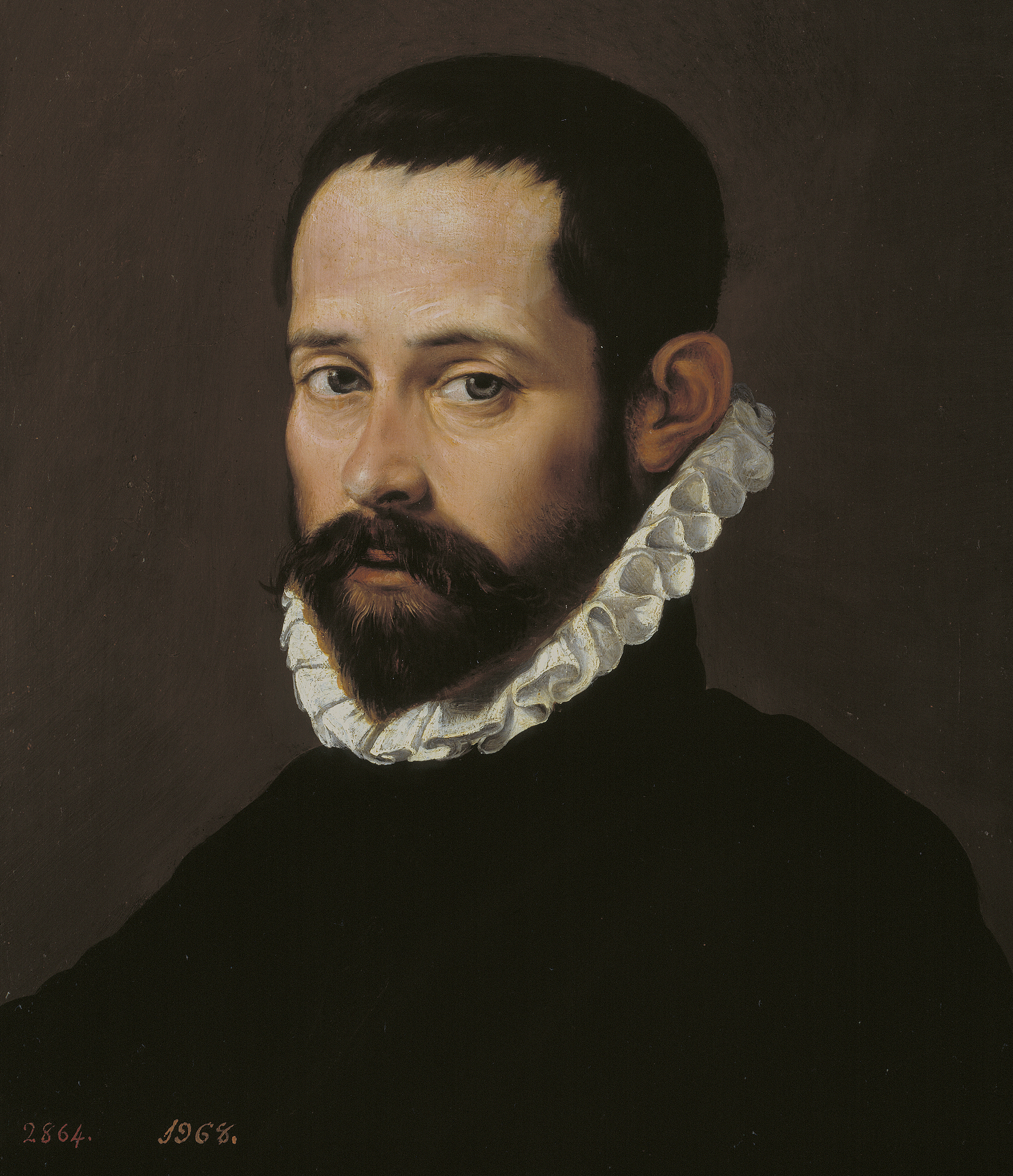 Retrato de Diego Hurtado de Mendoza recortado.